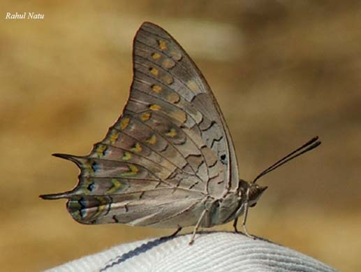 Rahul Natu